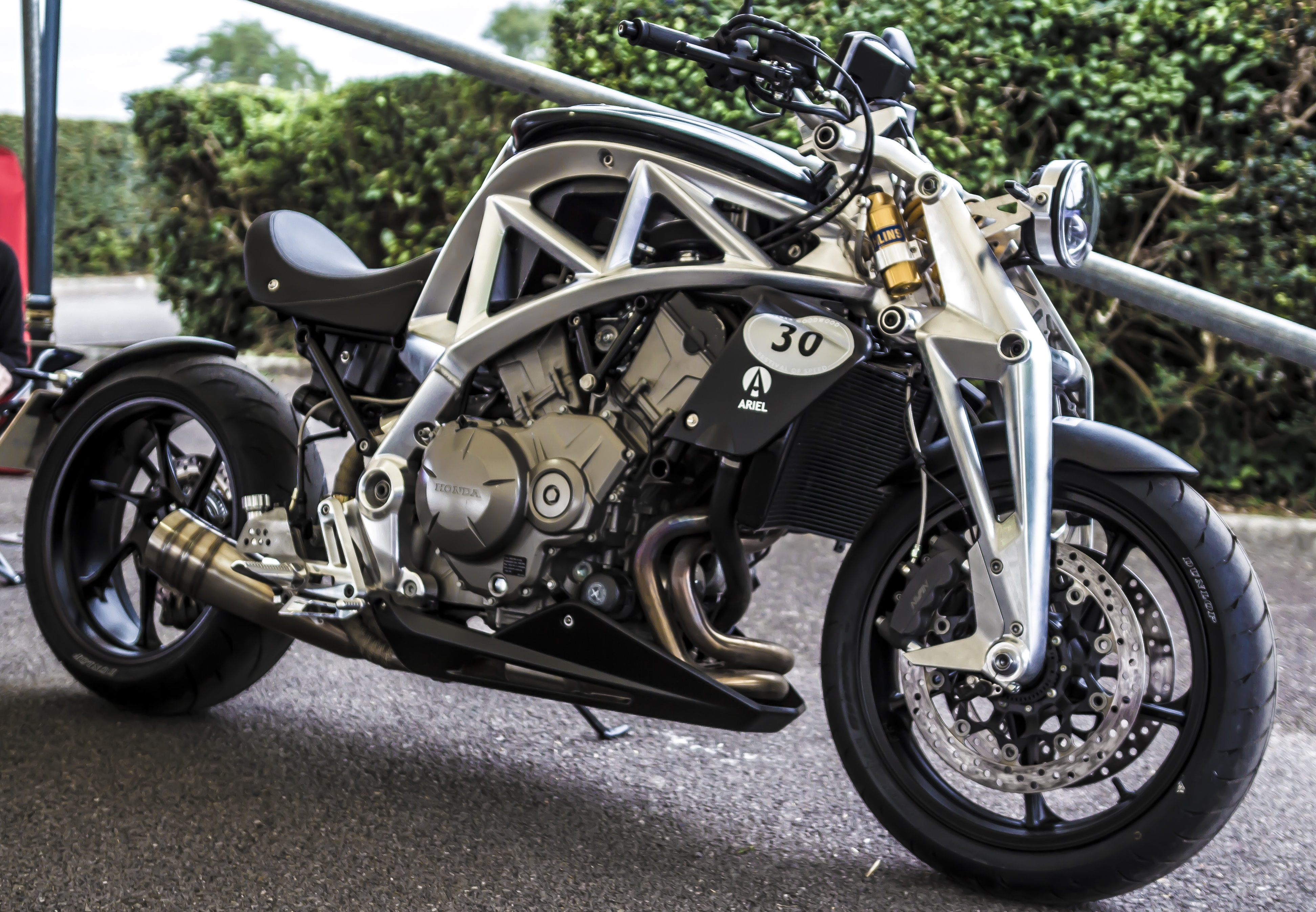 Ariel Ace (2015)